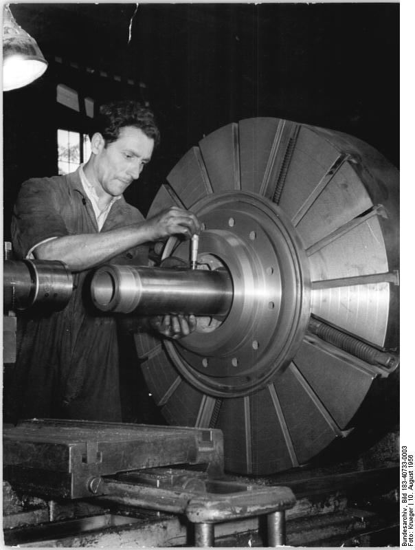 Zentralbild-Krueger-Krue-Sch. 10.8.1956 Wettbewerb von Mann zu MAnn im VEB Großmaschinenbau "7.Oktober". Im Berliner volkseigenen Betrieb Großdrehmaschinenbau "7.Oktober" war es nur schwer möglich, einen realen Wettbewerb von Mann zu Mann durchzuführen, da der Arbeitsablauf des Betriebes nicht durch eine Serienproduktion bestimmt wird. Durch Eiführung eines Auswertungsbogens, auf der täglich die Leistungen der kollegen abzulesen sind, wurde dieser Wettbewerb, der zur besseren Planerfüllung und zur Senkung des Ausschusses, der Fehl- und Verlustzeiten dient, möglich. So wurden zum Beispiel in der Dreherei die Verlustzeiten bei den einzelnen Maschinengruppen zwischen 4% und 9% gesenkt. Ubz.: Als einer der Besten im Wettbewerb gilt der Großdreher Artur Kaatz.